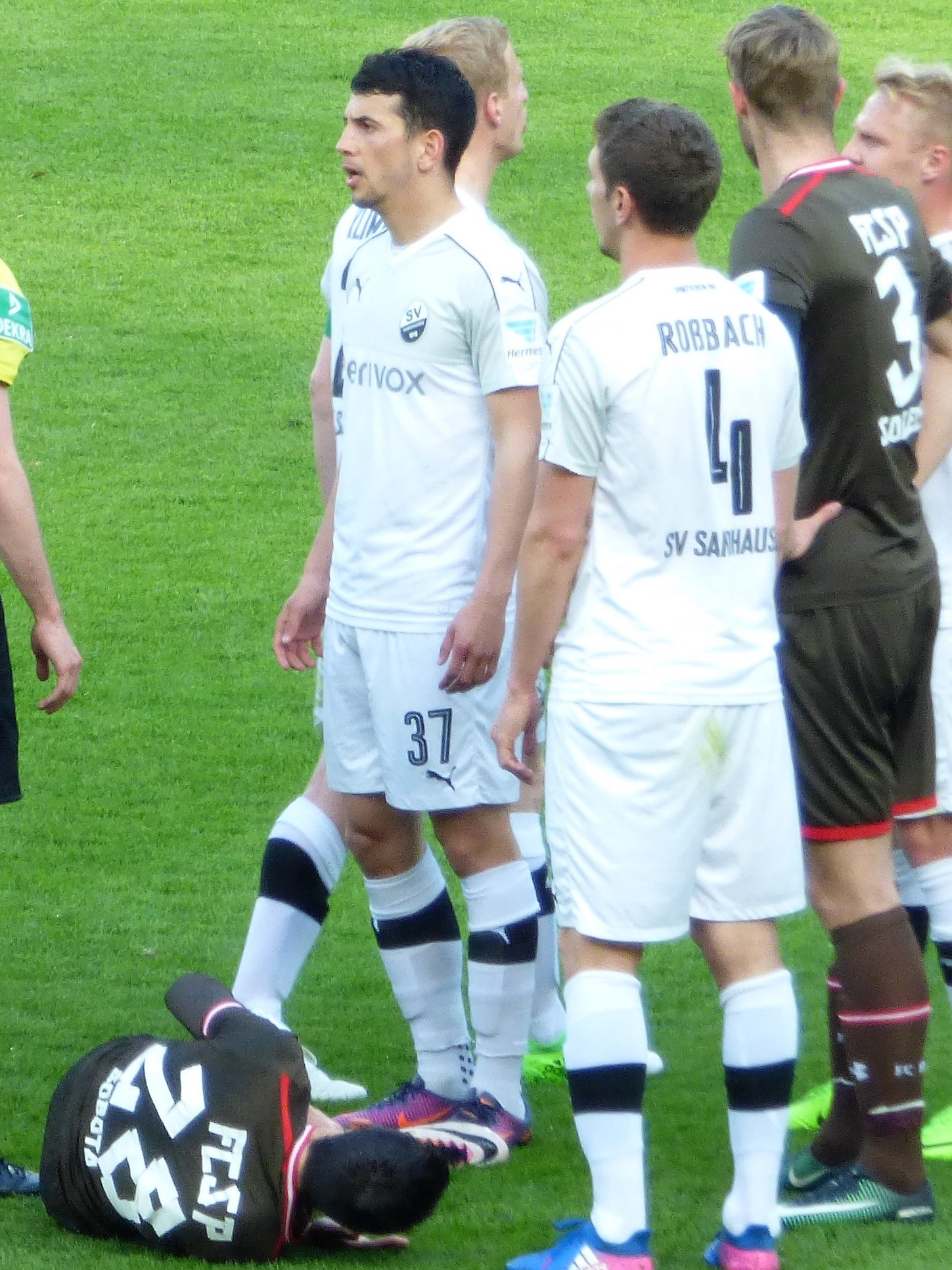 Julian Derstroff im Trikot des SV Sandhausen 2017